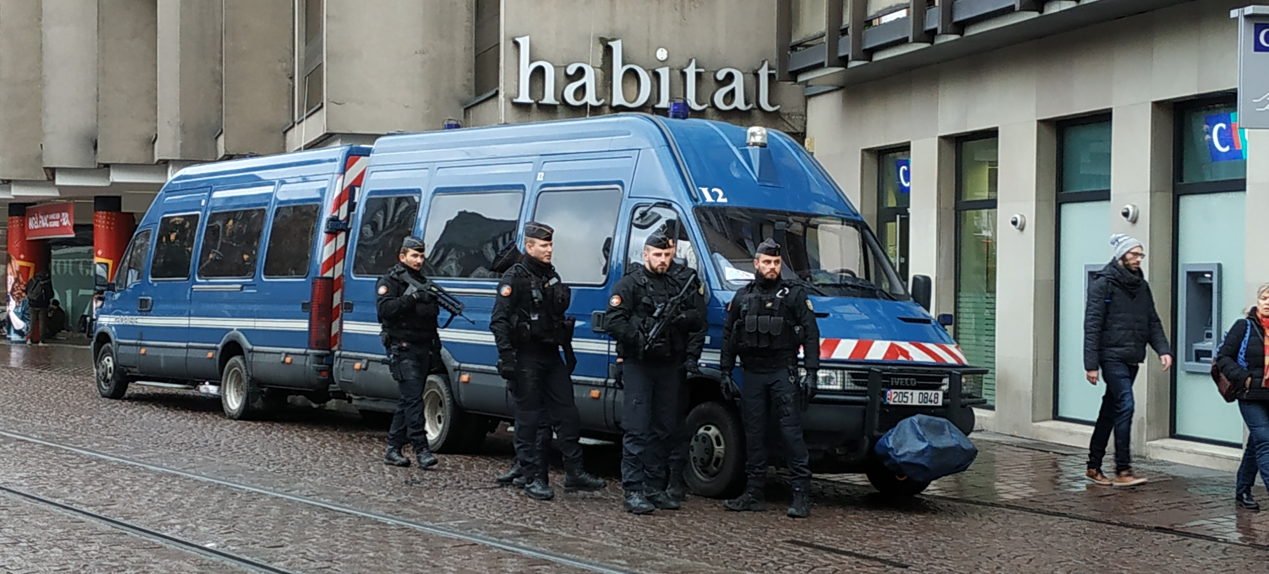 Gendarmerie mobile assurant la sécurité au sein de la grande île de Strasbourg, durant le marché de Noël 2018 et après l'attentat du 11 décembre.